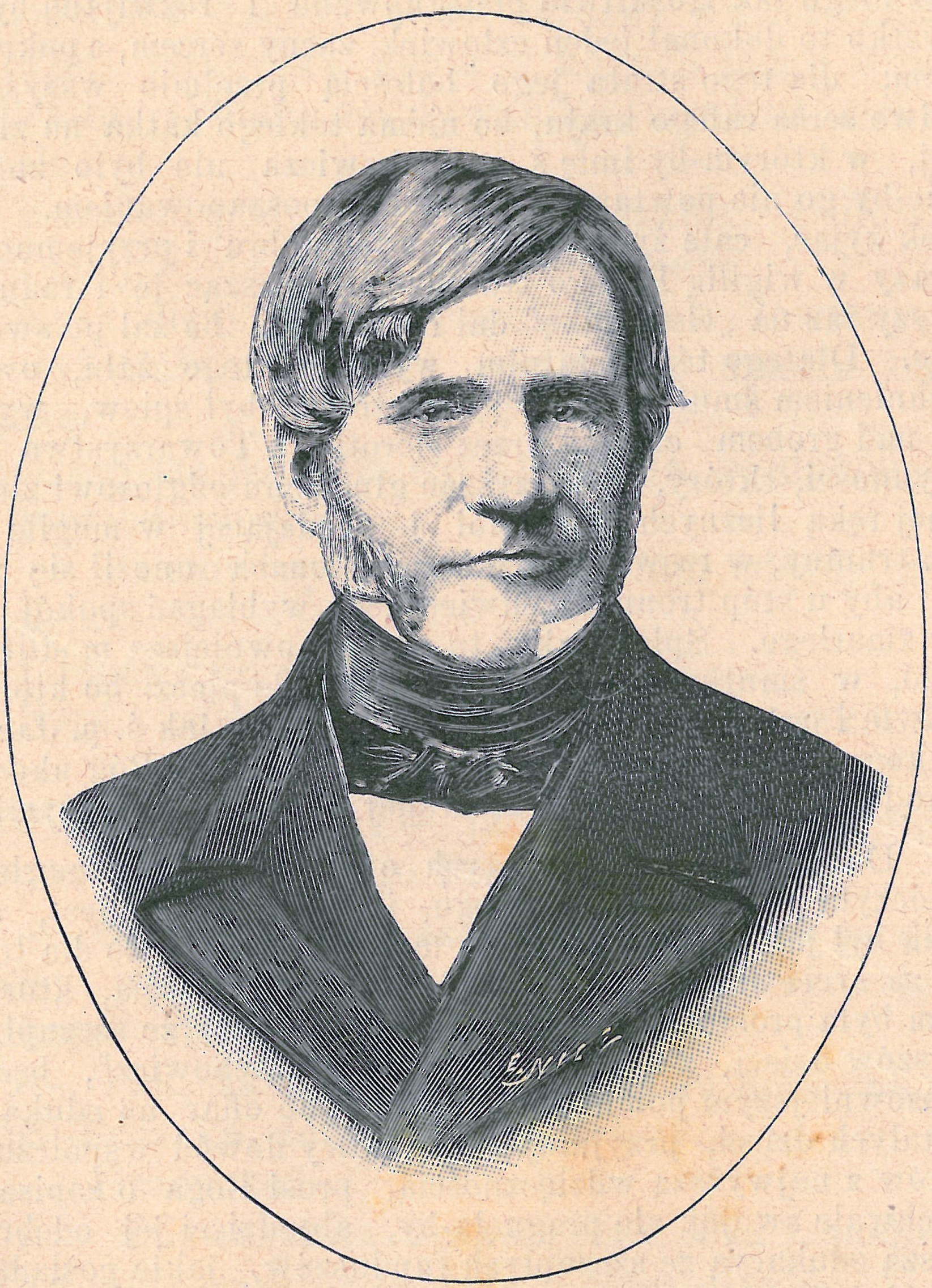 Ludwik Pietrusiński (1803-1865)